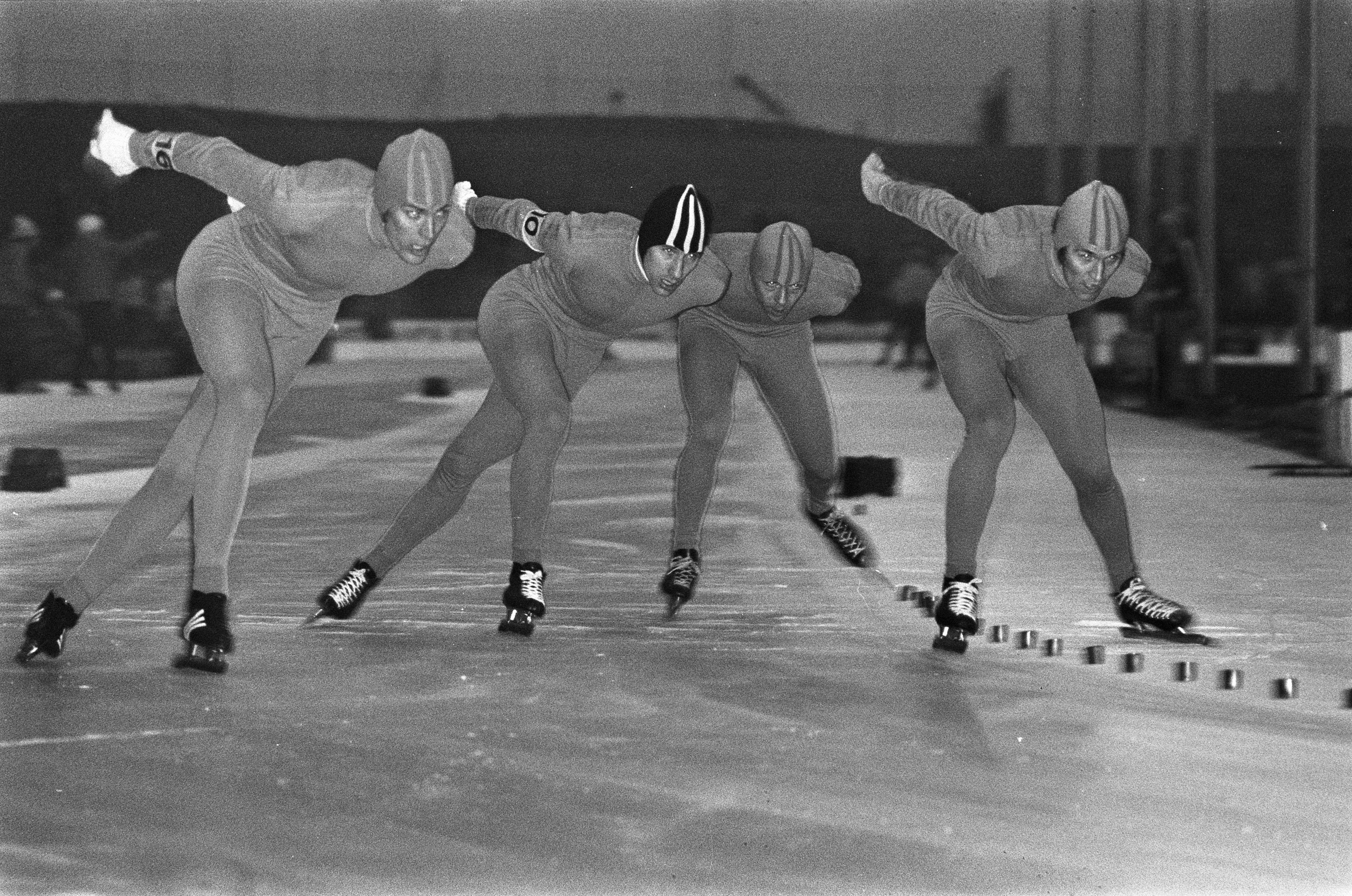 Collectie / Archief : Fotocollectie Anefo Reportage / Serie : [ onbekend ] Beschrijving : Schaatswedstrijden voor eerste ISSL World Cup voor prof op De Uithof in Den Haag , Nederland tijdens ploegenachtervolging, Schenk, Verkerk, Verheyen en Bols Datum : 6 januari 1973 Locatie : Den Haag, Zuid-Holland Trefwoorden : SCHAATSEN, sport Persoonsnaam : Bols, De Uithof, Issl World Cup Fotograaf : Verhoeff, Bert / Anefo Auteursrechthebbende : Nationaal Archief Materiaalsoort : Negatief (zwart/wit) Nummer archiefinventaris : bekijk toegang 2.24.01.05 Bestanddeelnummer : 926-1415